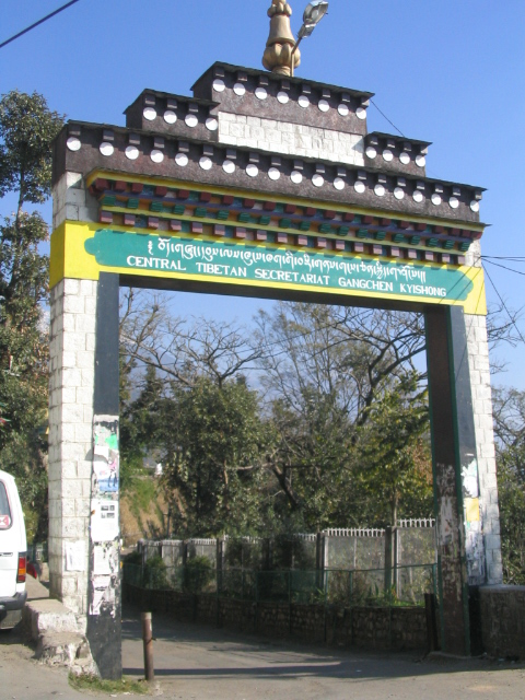 Gangchen Kyishong, Dharamsala, Ekzilita tibeta registaro